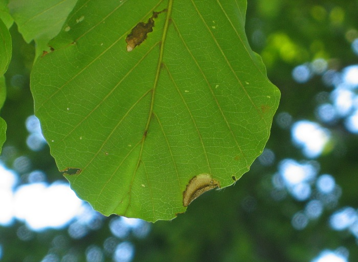 Mine von Parornix fagivora